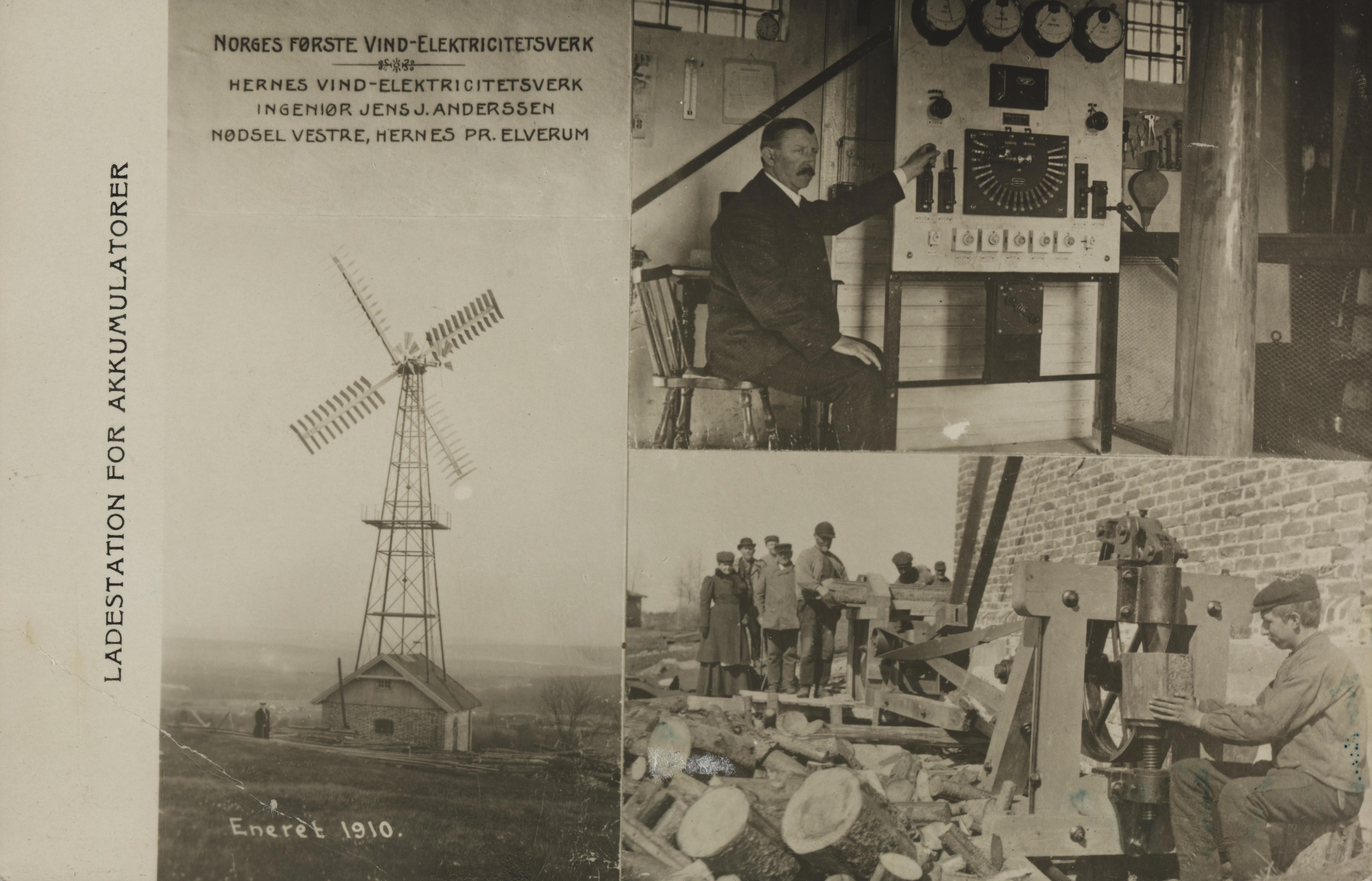 Bildet er hentet fra Nasjonalbibliotekets bildesamling Hernes,Nødsel Vestre, Elverum, Hedmark Depicted person: Bull-Andersen, Jens Jørgen